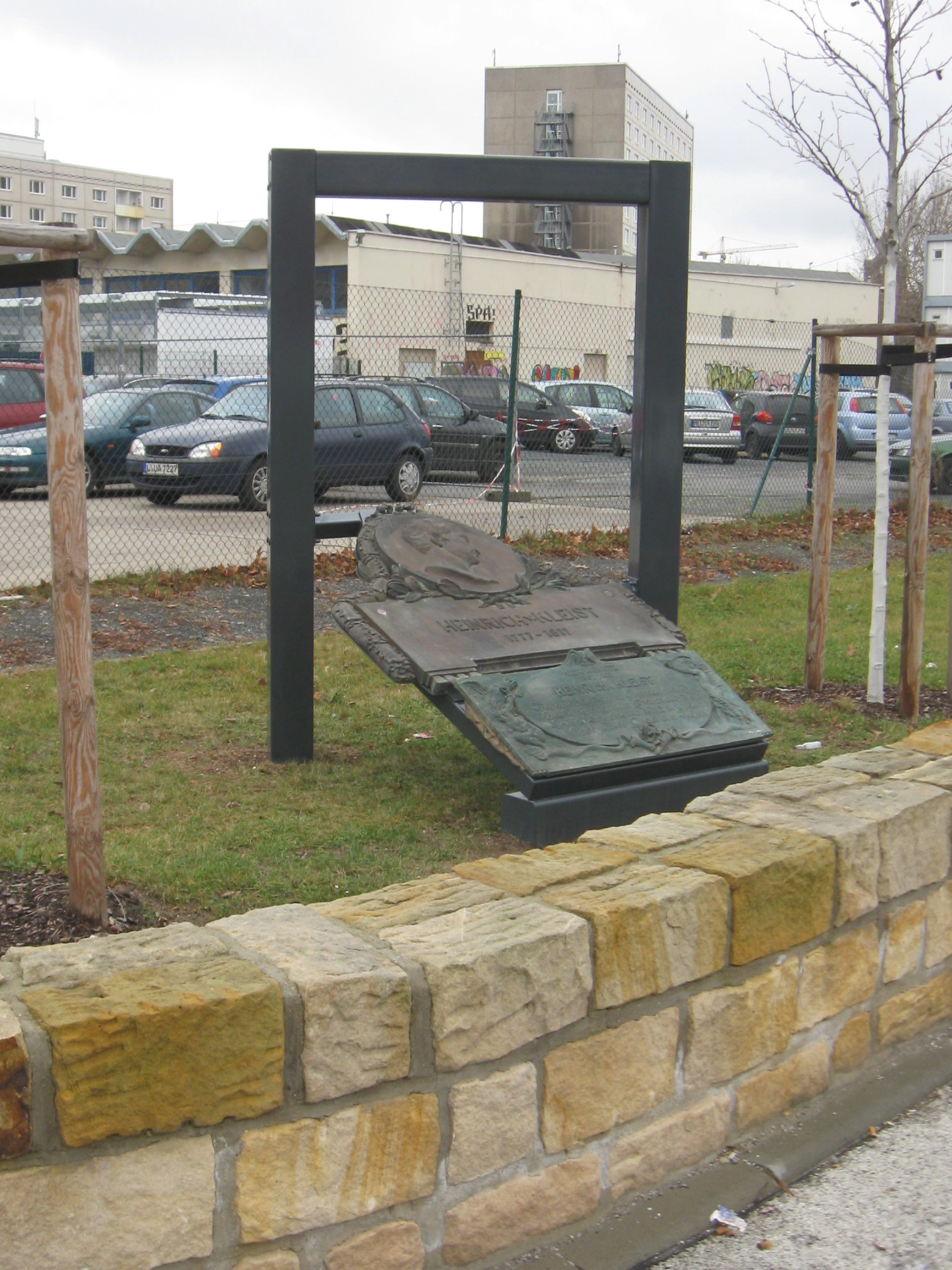 Kleistdenkmal von 2011 in Dresden-Altstadt, Pillnitzer Str. Ecke Gerichtsstr., am Ort seines ehemaligen Wohnhauses "Äußere Rampische Gasse" (später Pillnitzer Str. 29; am 13.2.1945 zerstört) mit den Relikten der Gedenktafeln der Tiedgestiftung von 1909.